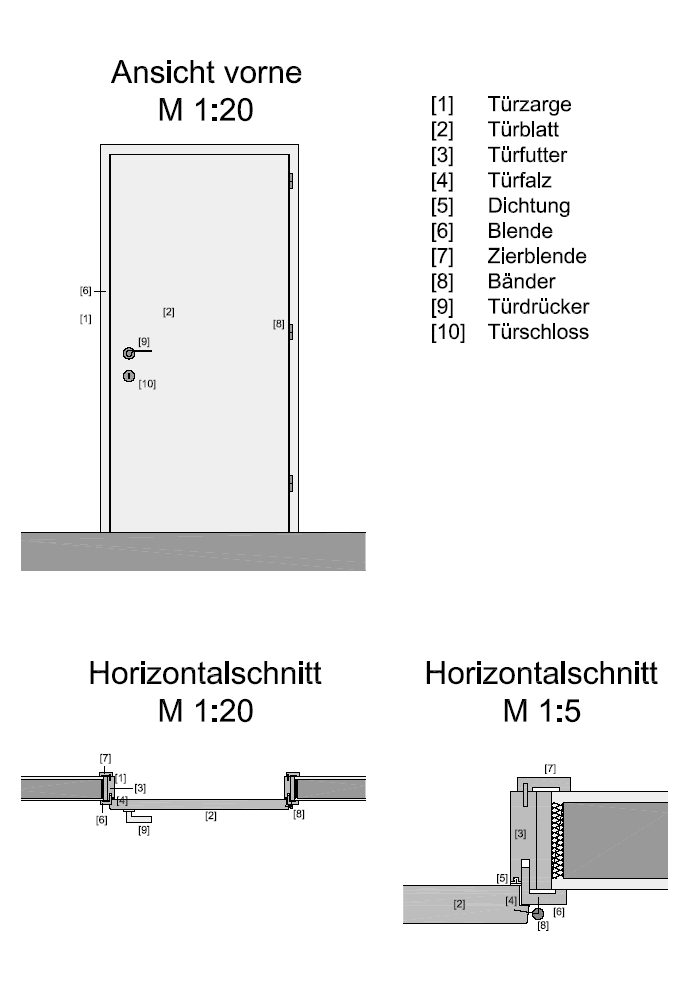 Bauteile einer Innentüre.